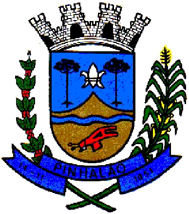 Brasão de Pinhalão